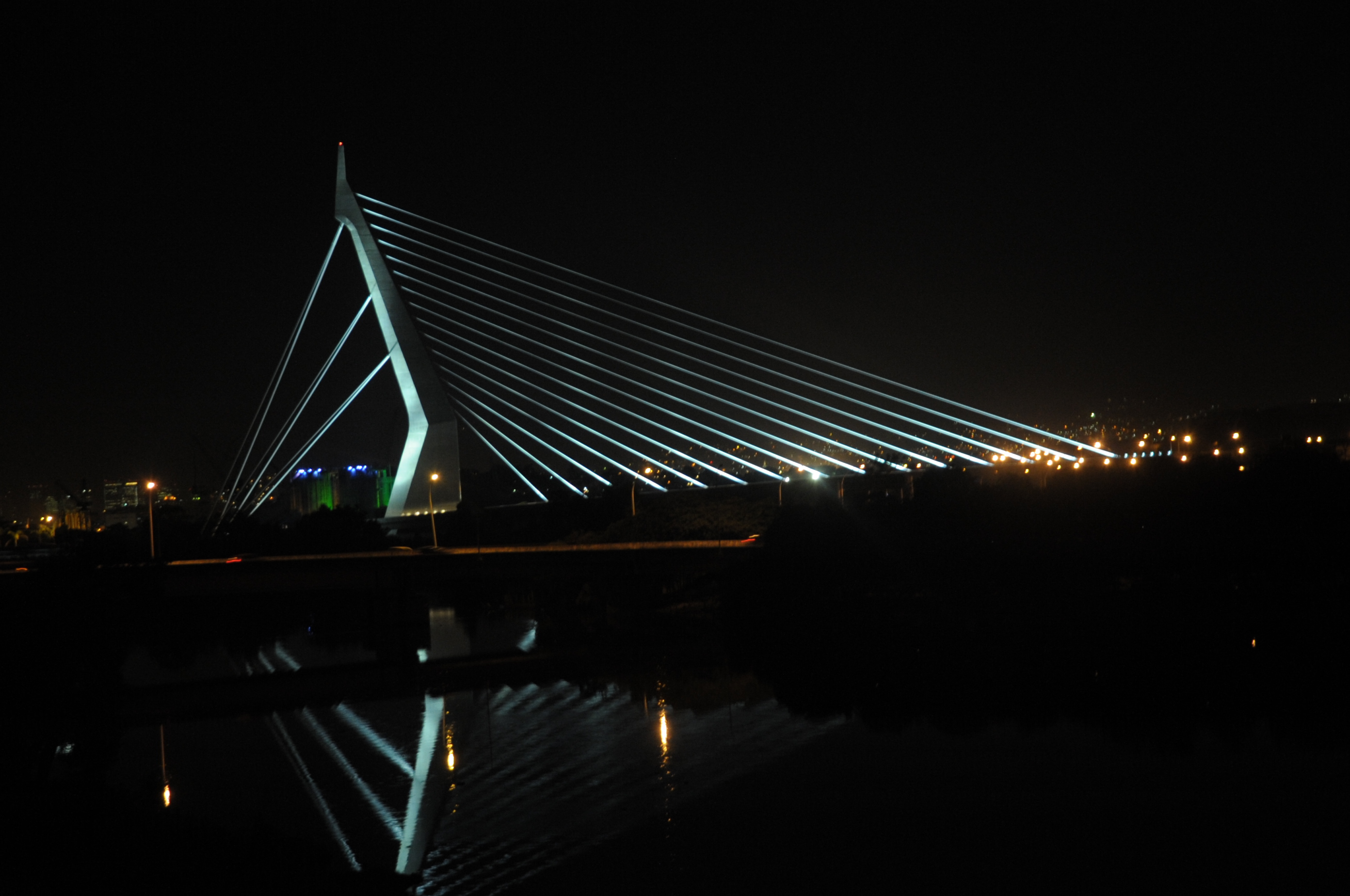 A Ponte do Saber é uma ponte estaiada localizada no Rio de Janeiro.